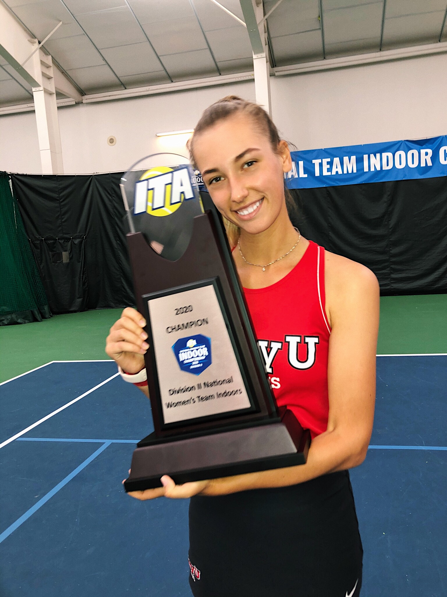 Марія Євгенівна Скиба (нар.7 квітня 2000, Львів) - українська тенісистка, майстер спорту України з великого тенісу та переможець чемпіонатів України до 16, 18 років та серед дорослих в одиночному, парному та змішаному розрядах